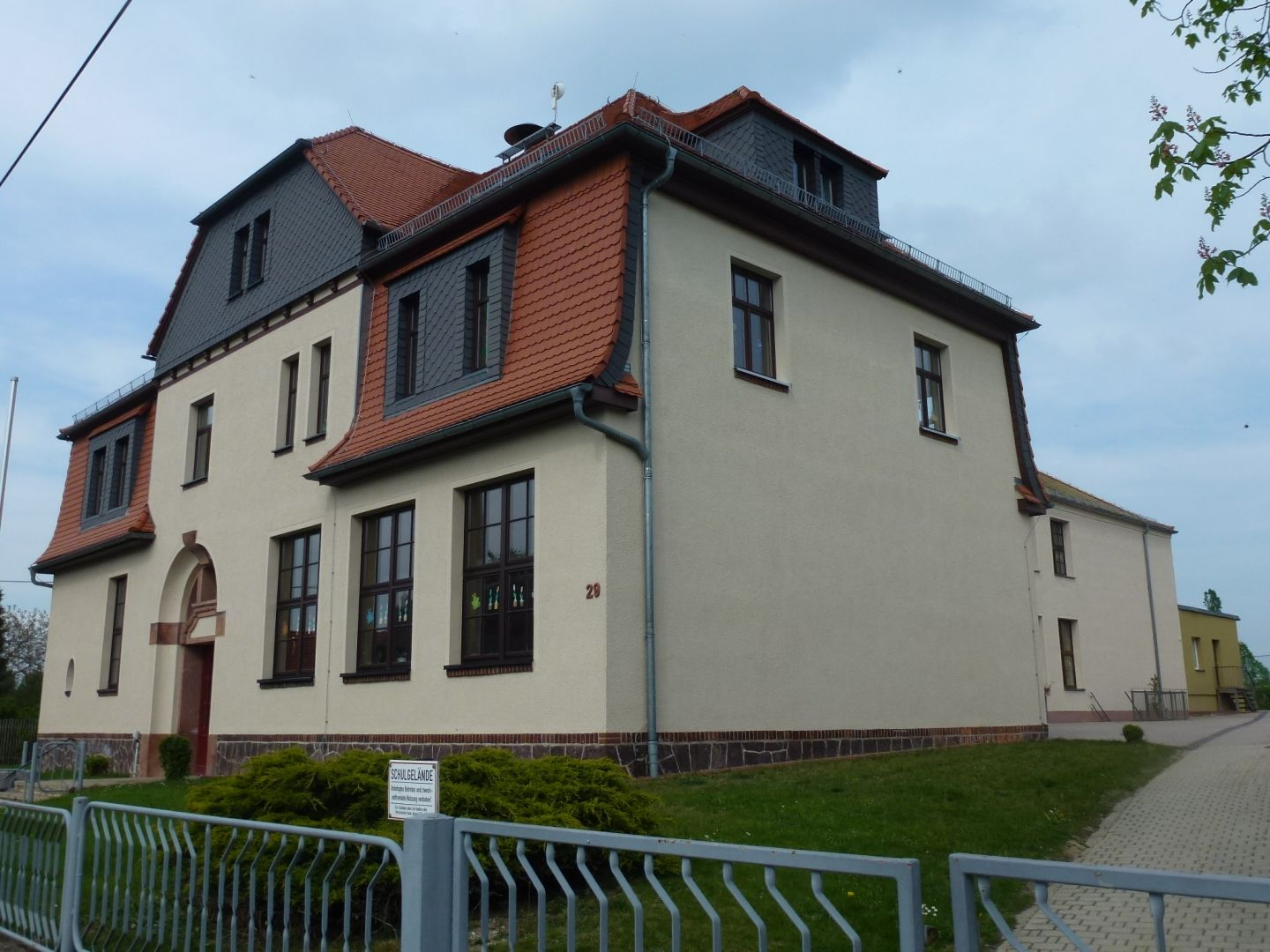 Schule in Frankenhain